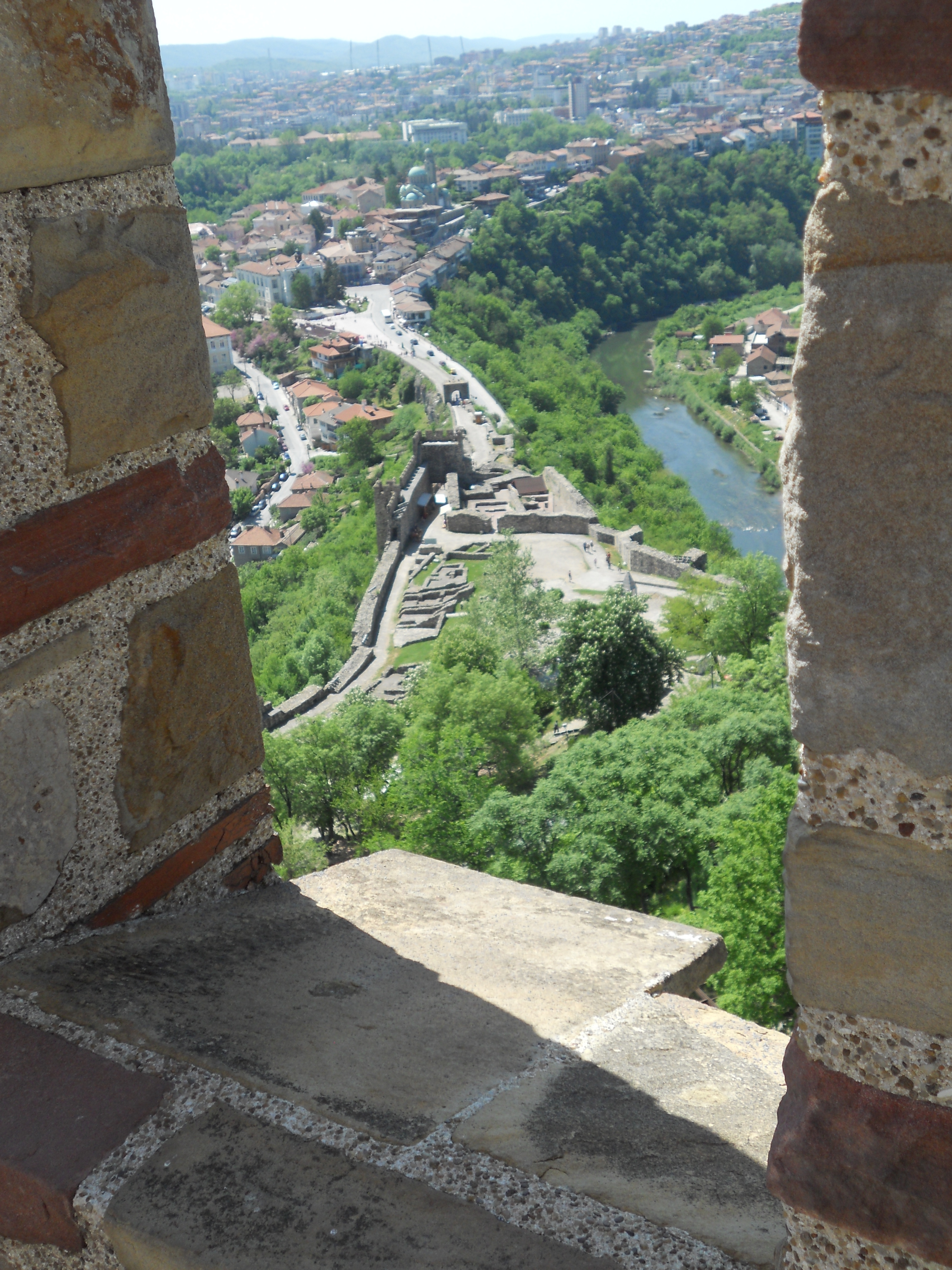 Изглед между крепостните зъбери на Патриаршеската кула към главната порта на крепостта Царевец